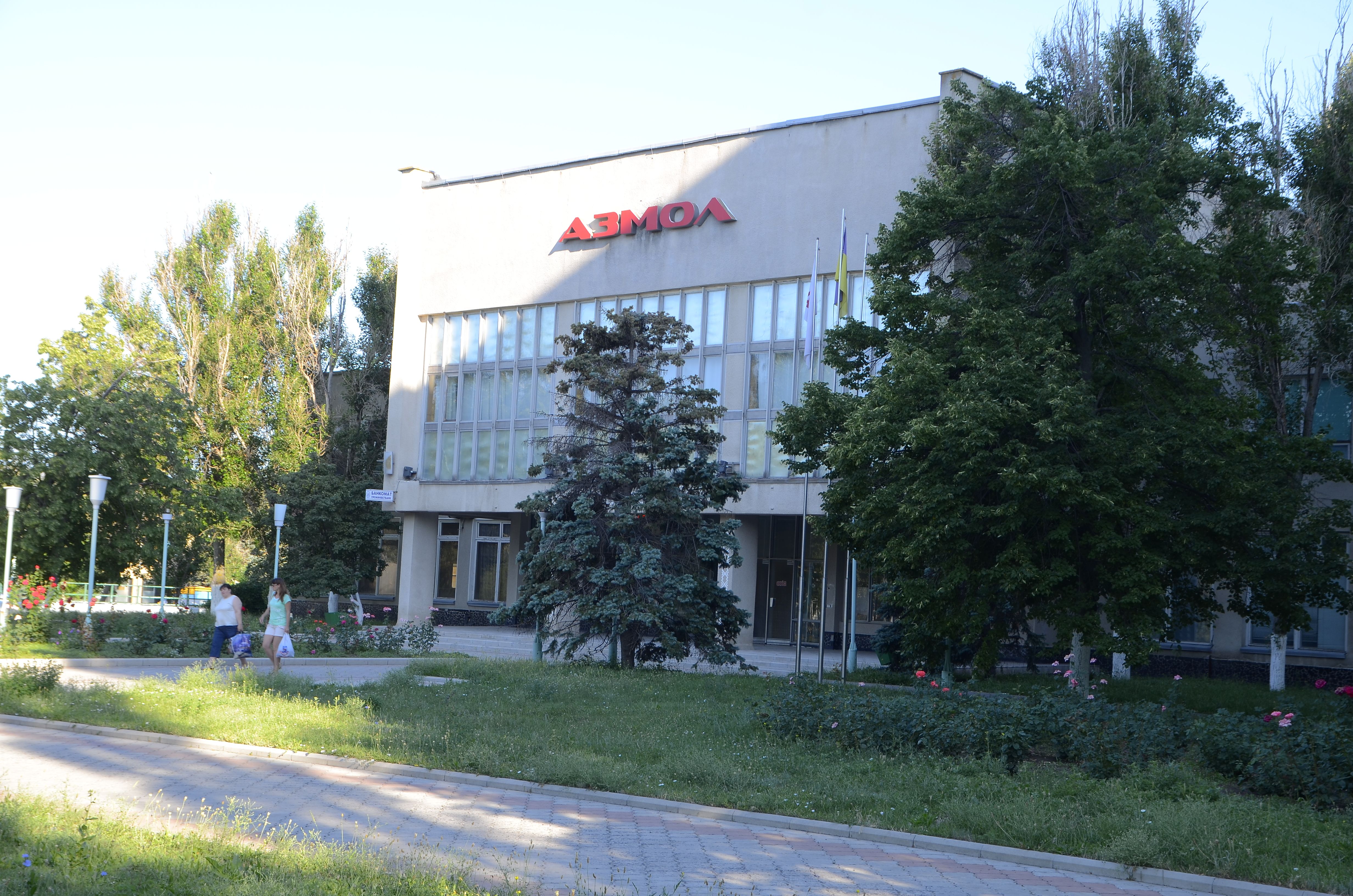 Бердянск